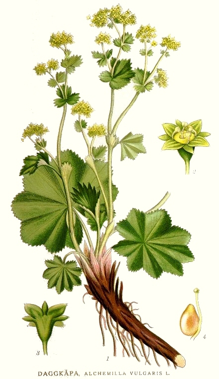 Alchemilla vulgaris L. Original Description Daggkåpa, Alchemilla vulgaris L.